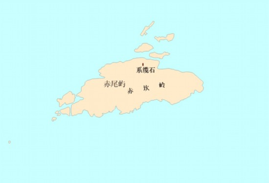 赤尾屿山川河岳地形图